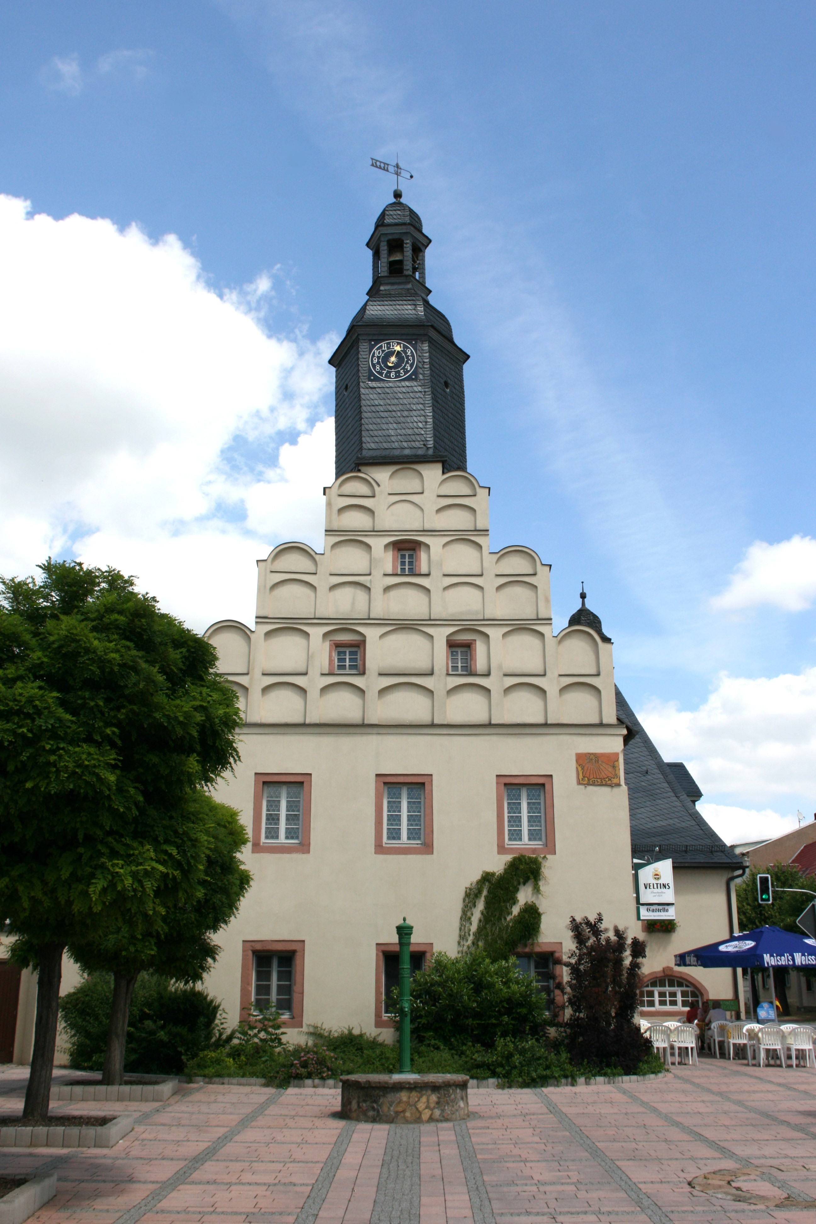 Rathaus Allstedt, Markt 10 in Allstedt